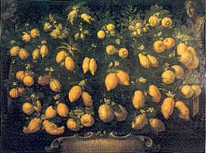 Bartolomeo Bimbi Citrus Collection des Medici